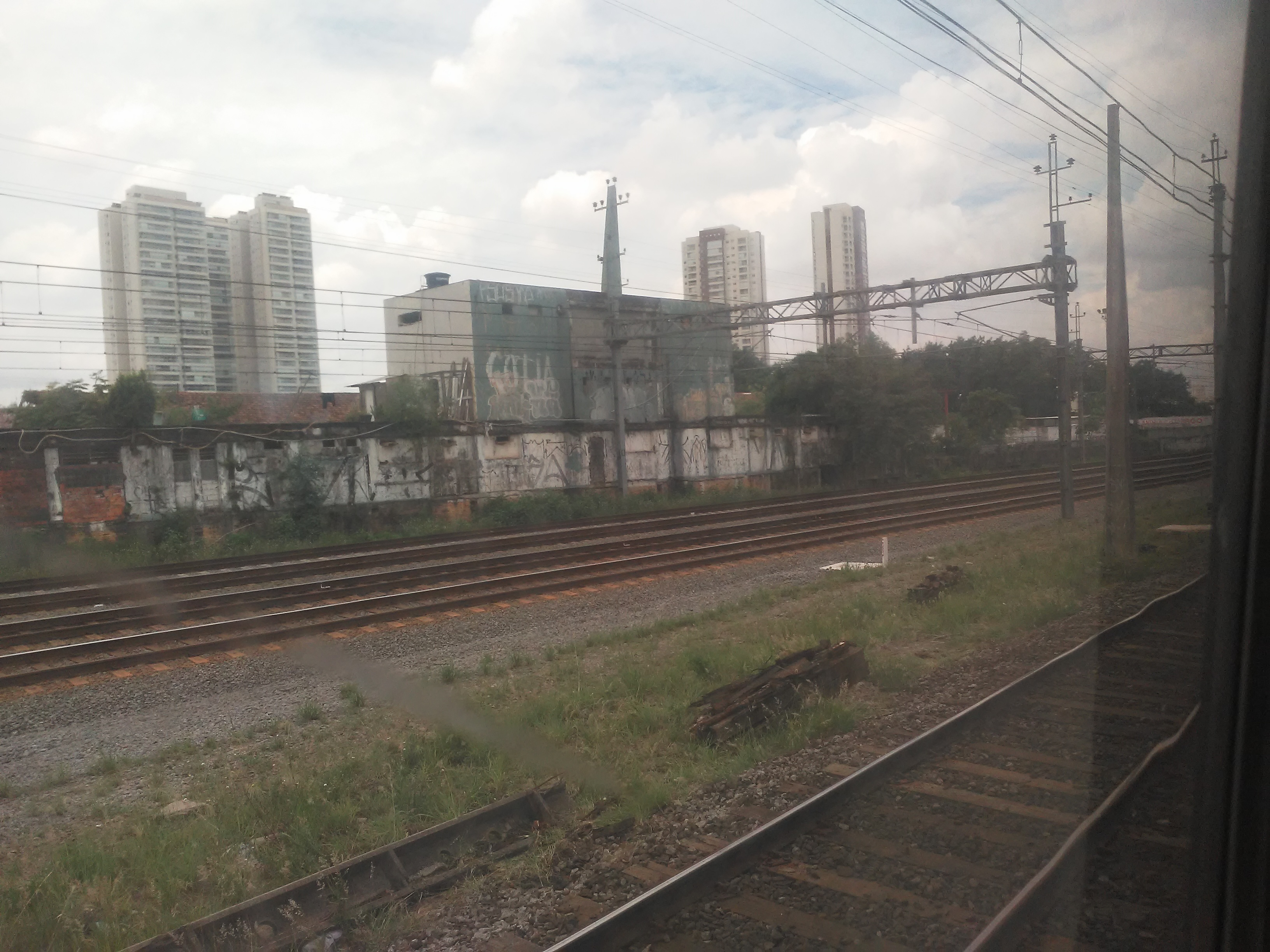 Estação Barra Funda da EFSJ, construída entre 1962/4 e desativada em 1998